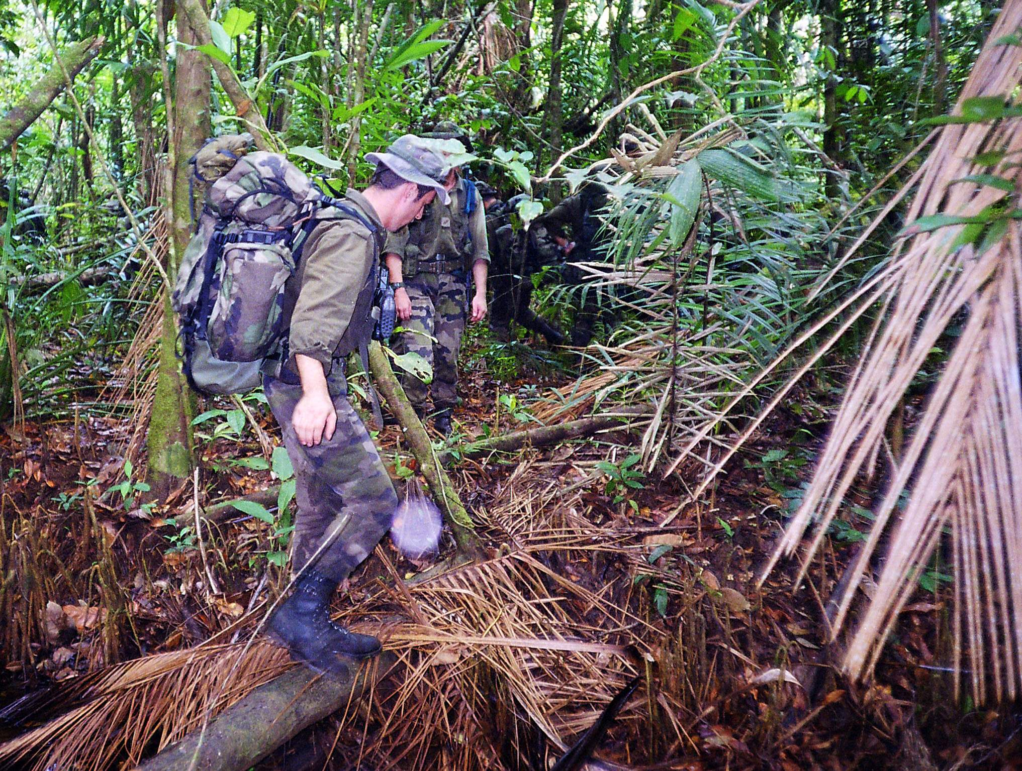 Progression en forêt au 3e régiment étranger d'infanterie à Kourou en Guyane (France)